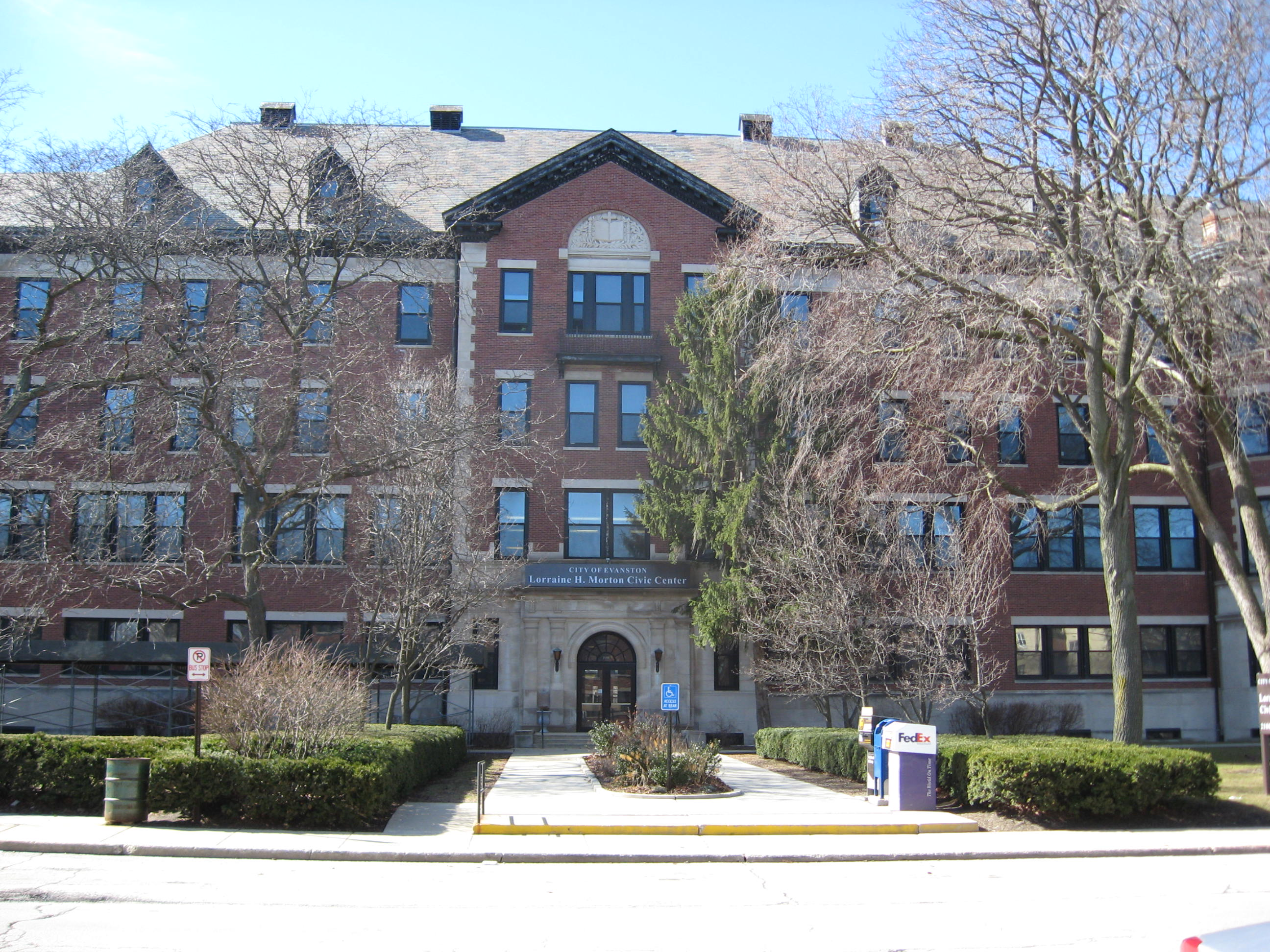 2100 Ridge Ave Evanston, IL 60201 (847) 328-2100